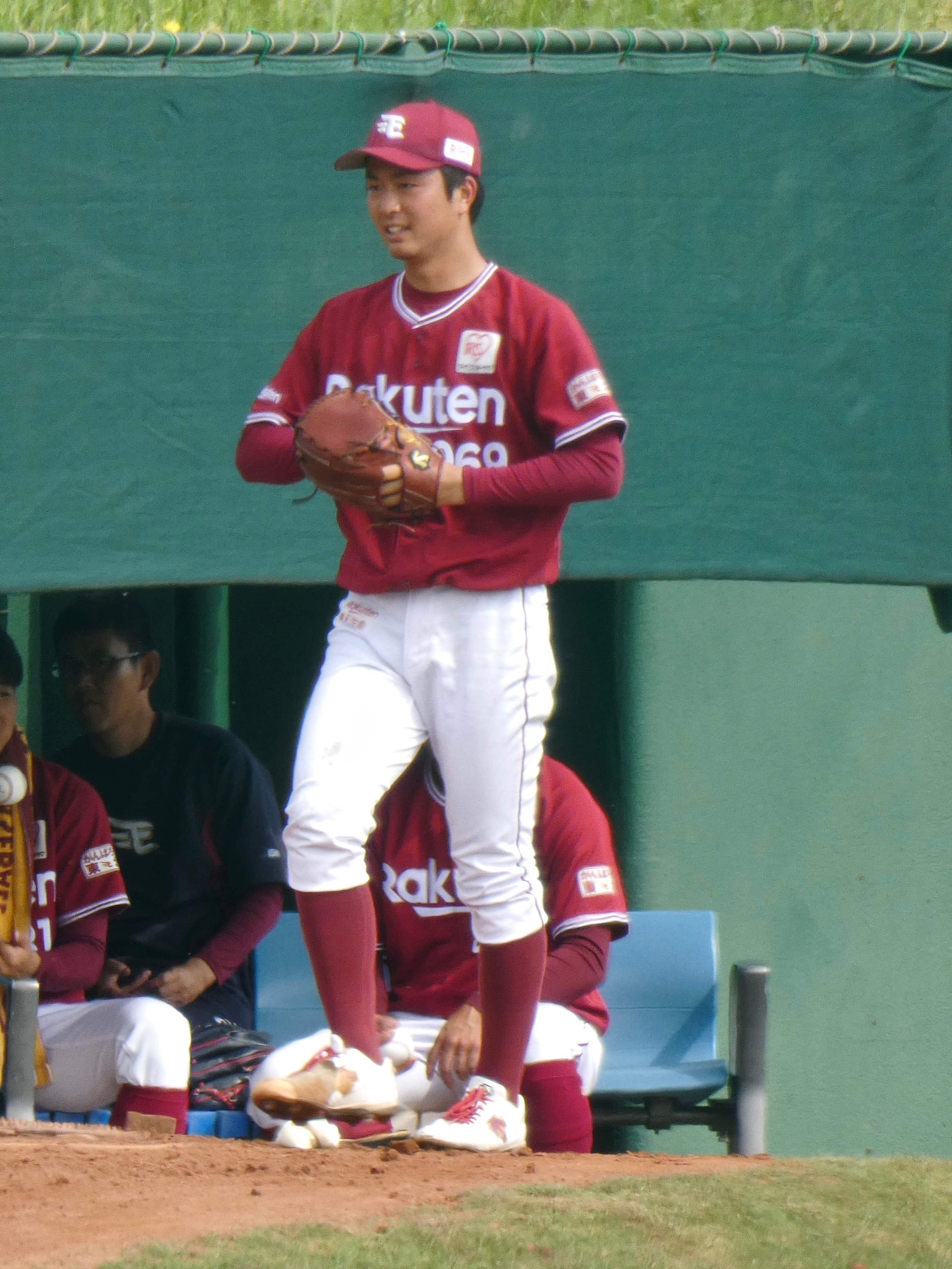 東北楽天ゴールデンイーグルスの選手「野元浩輝」。ヤクルト戸田球場にて。